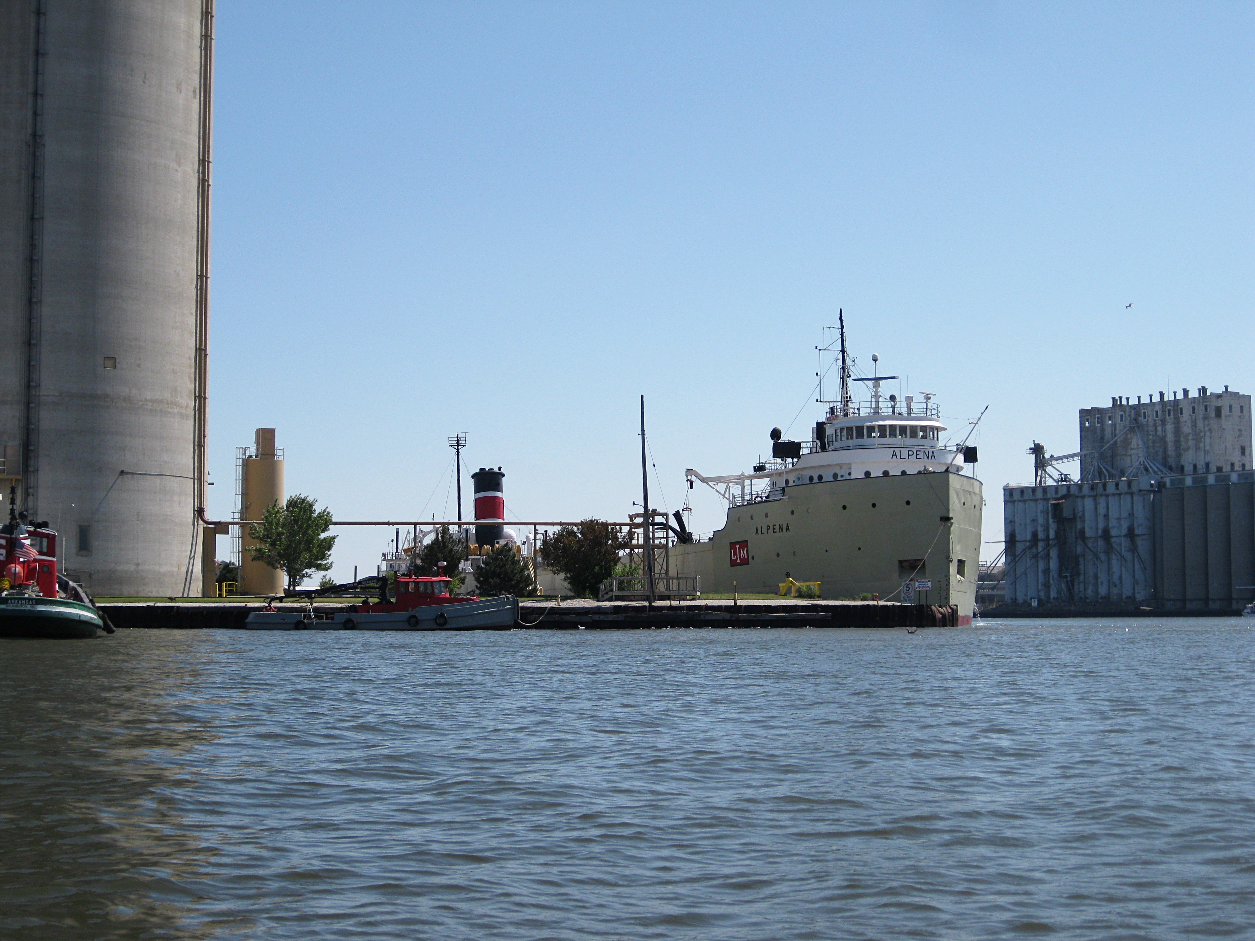 Bulk carrier Alpena (1942) - IMO: 5206362 - MMSI: 366893910